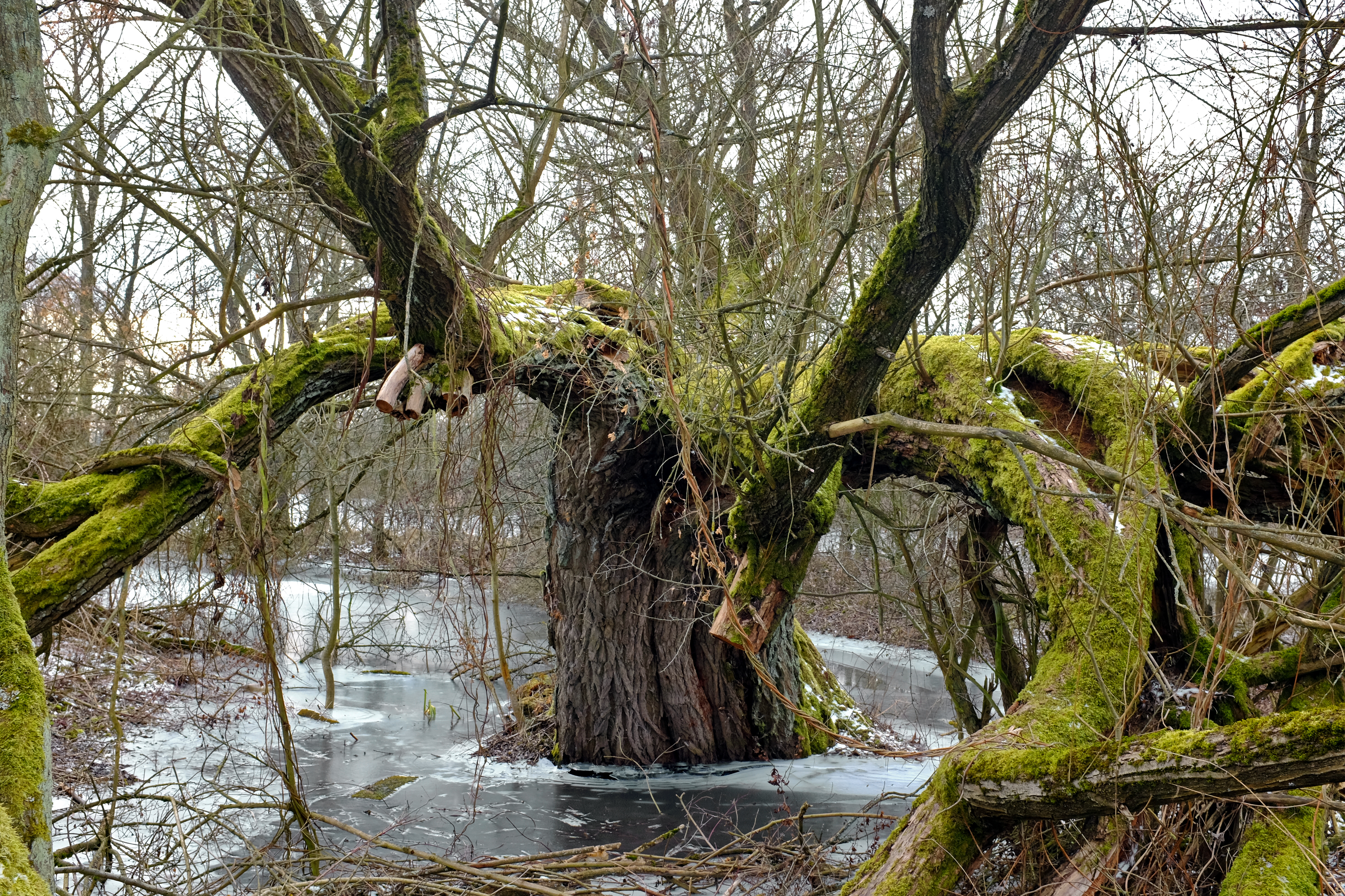 Tvrziště, pp. 313/5, Sedlec (Karlovy Vary).